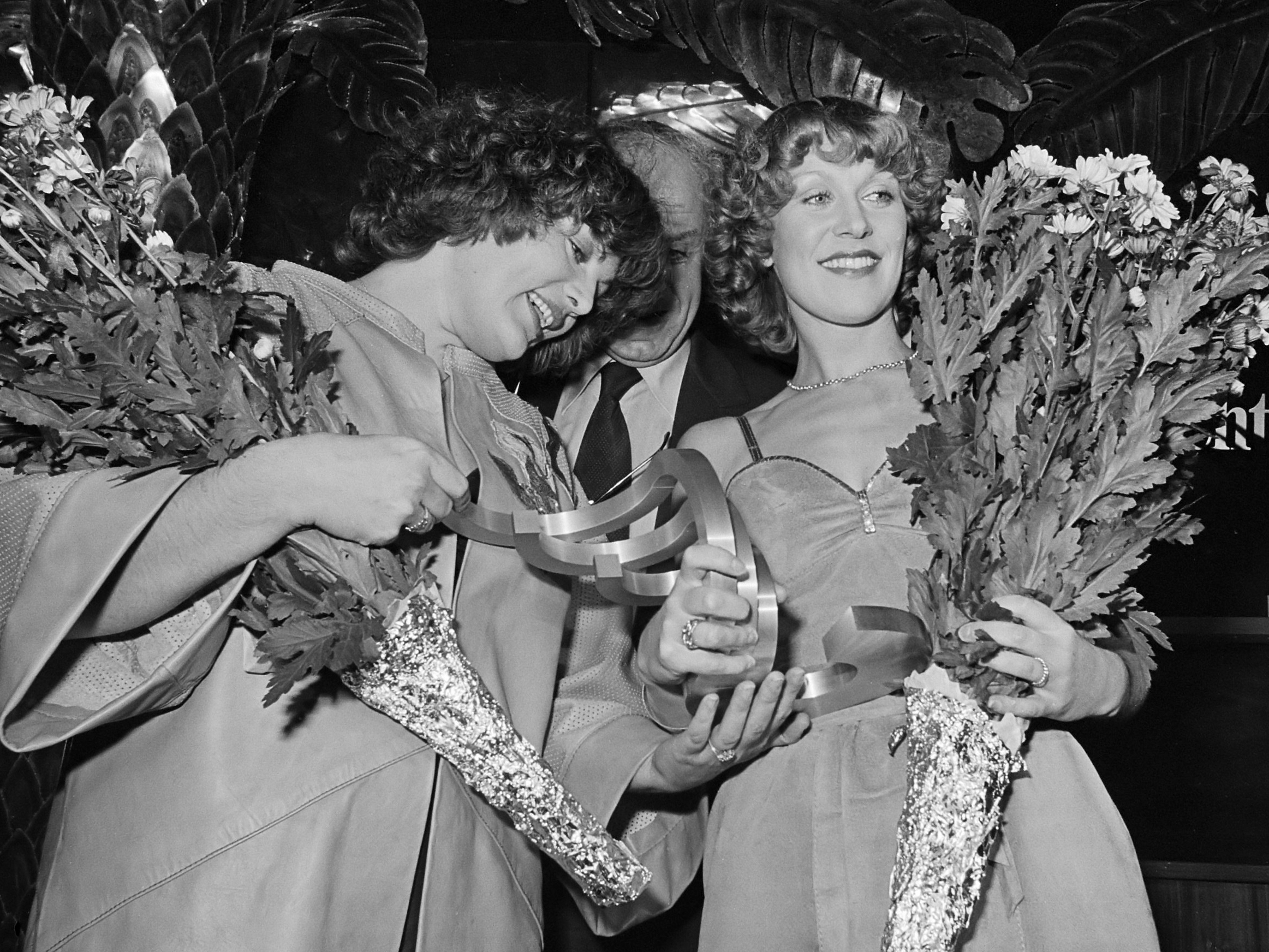 Pall Mall export prijs voor Sytha Bolt (l) en Teske van Ossenaarde 27 november 1978